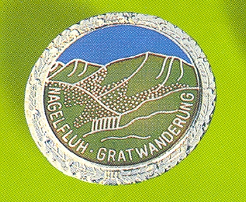 Medaille Nagelfluh Gratwanderung